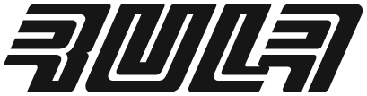 Логотип советской торговой марки «Rula», выпускавшей скейтборды в 1980-е годы. Логотип воссоздан с оригинального экземпляра деки скейтборда.